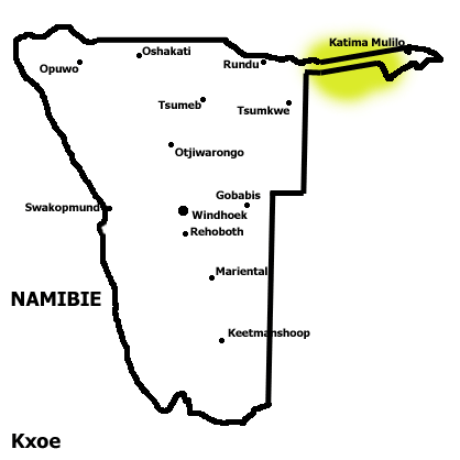 Verspreiding Khoisantaal Kxoe in de Caprivistrip, Namibie.